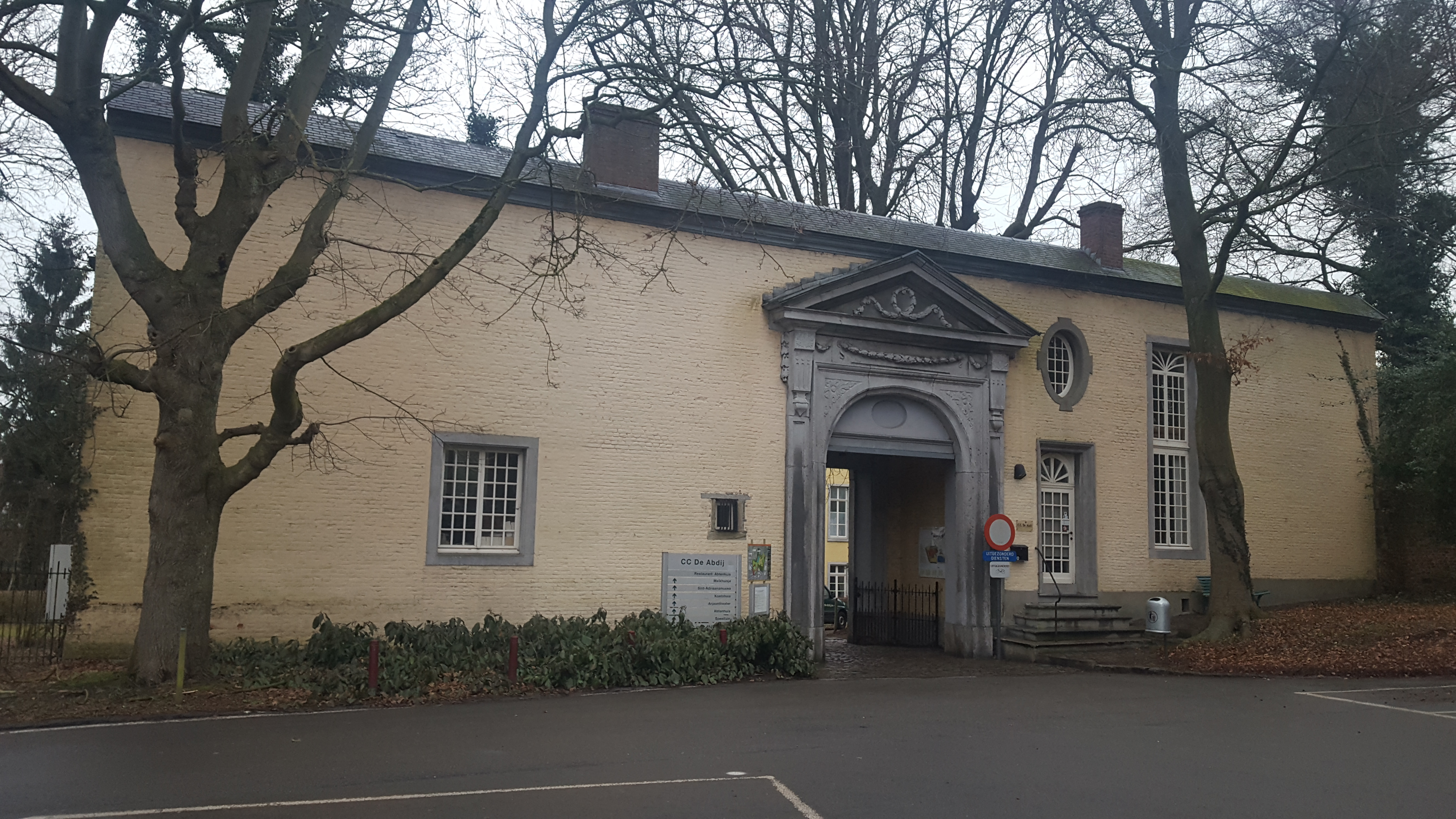 Sint-Adriaansabdij, Geraardsbergen, België